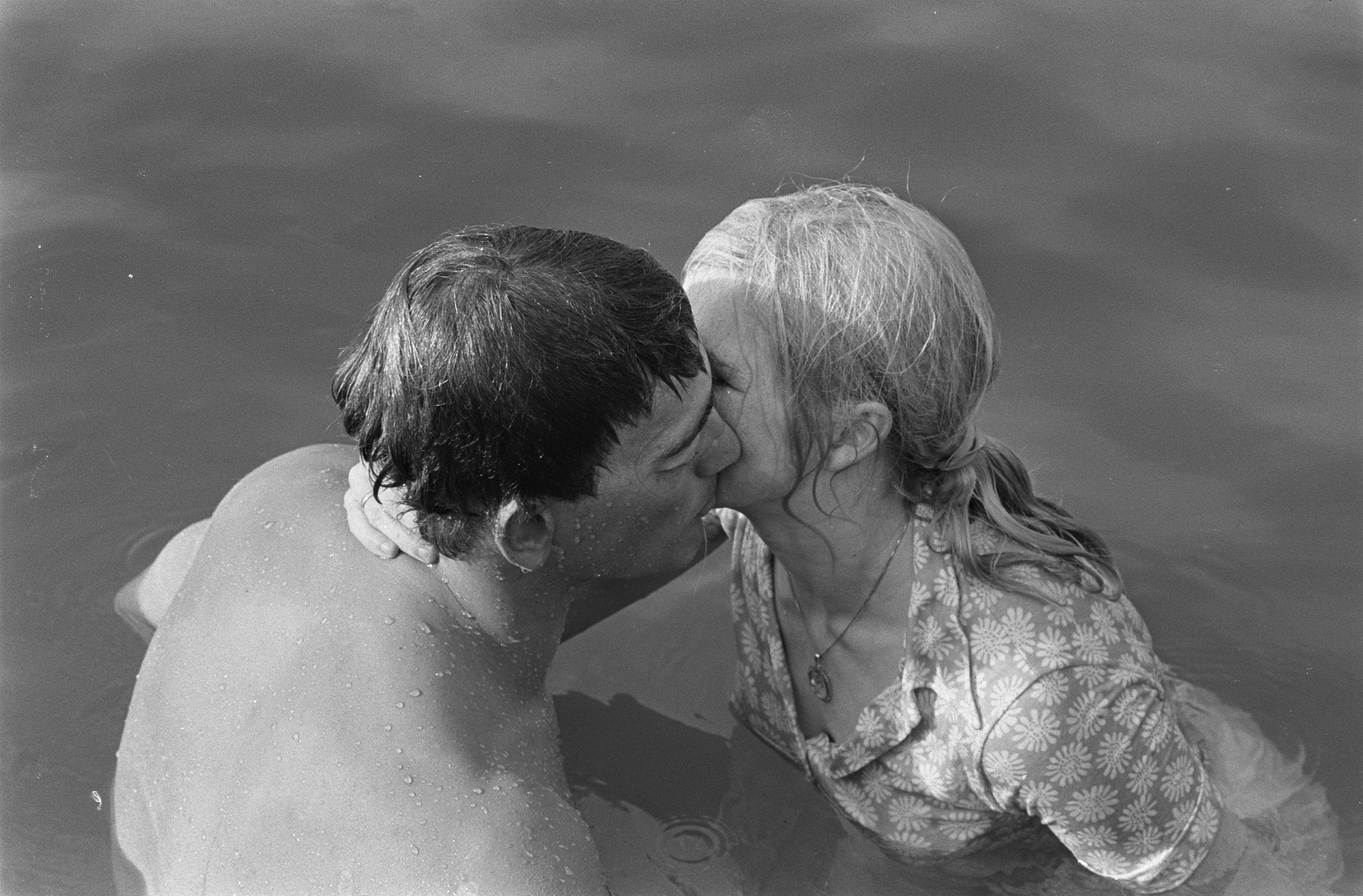 Collectie / Archief : Fotocollectie Anefo Reportage / Serie : Internationaal zwemmarathon op Maarsseveense Plassen ; Johan Schans wordt in water omhelsd door echtgenote Beschrijving : Johan Schans wordt in water omhelsd door echtgenote Datum : 27 juni 1970 Locatie : Maarsseveen, Maarsseveense Plassen, Utrecht (provincie) Trefwoorden : echtgenotes, marathon, omhelzingen, watersporten, winnaars, zwemmen Persoonsnaam : Schans, Joh. Fotograaf : Joost Evers / Anefo Auteursrechthebbende : Nationaal Archief Materiaalsoort : Negatief (zwart/wit) Nummer archiefinventaris : bekijk toegang 2.24.01.05 Bestanddeelnummer : 923-6285